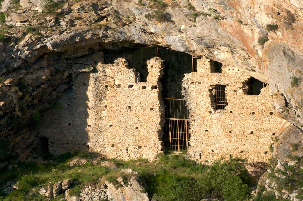 Il muro della Balma